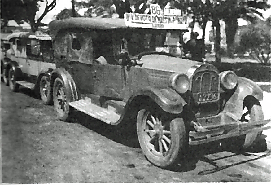 Auto-colectivo, línea 86, luego 105, en 1930. Recorrido de Devoto a Plaza de Mayo Colectivos de Buenos Aires, Argentina.